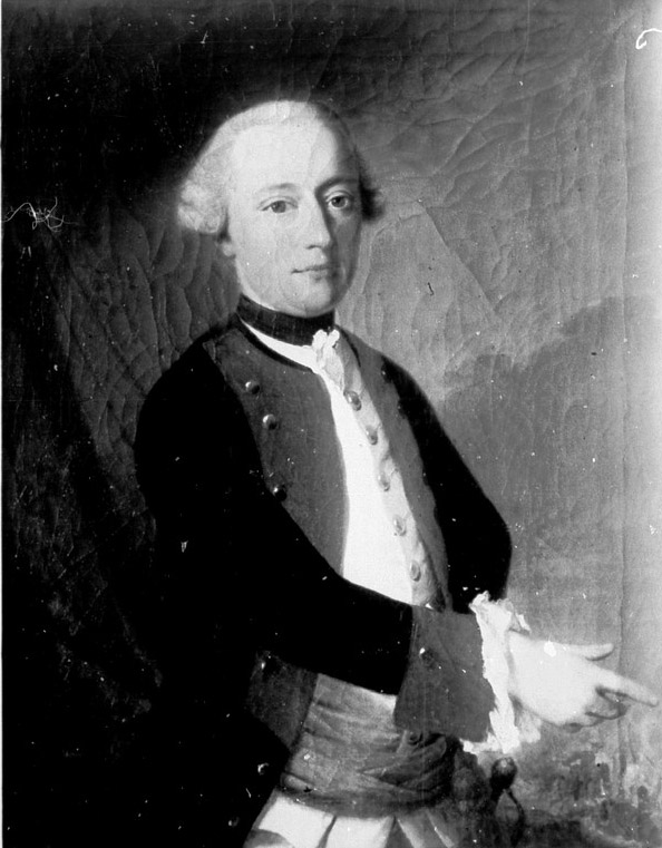 [Bildindex der Kunst und Architektur]